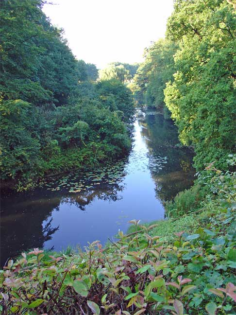 "De Steile Oever" met in de diepte een afgesneden rivierbocht van de Regge bij Nieuwebrug (ten zuiden van Ommen) Categorie:Afbeelding Overijssel